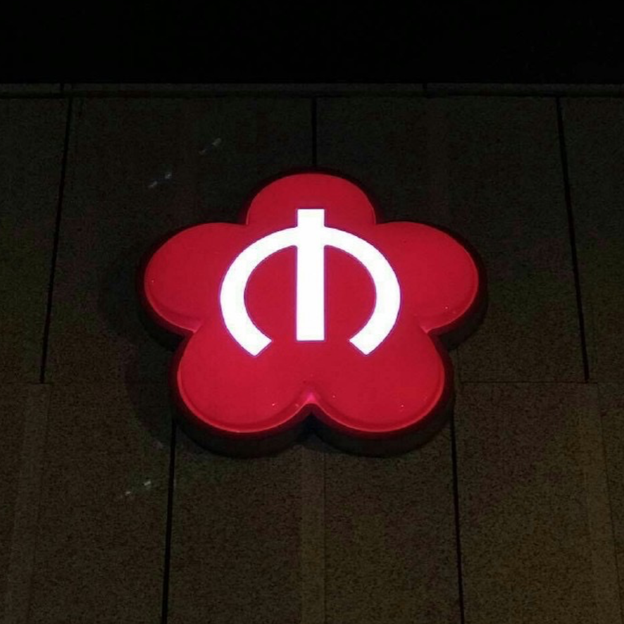 Nankingmetrologo